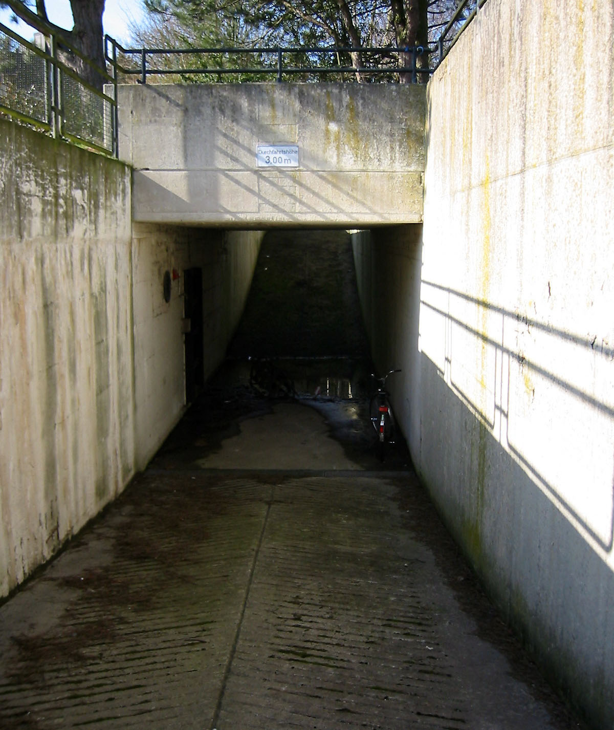 Rampe am Vordereingang des Bunkers des Hilfskrankenhaus Wedel